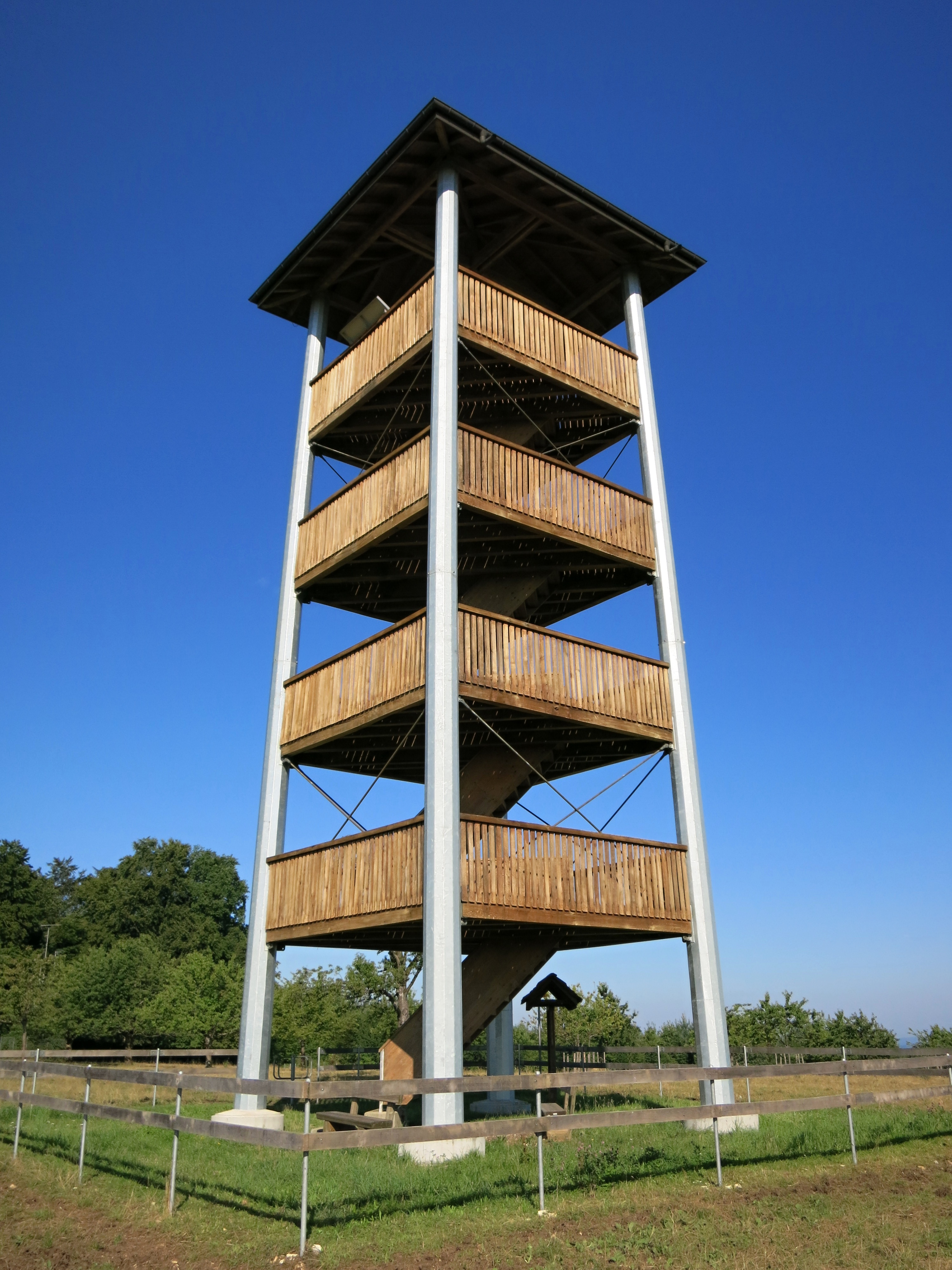 Aussichtsturm Mont Renaud